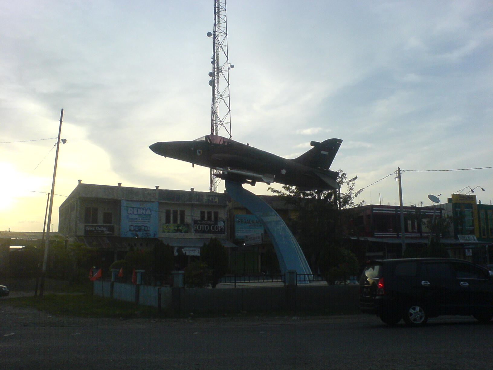 Tugu pesawat di Simpang Aneuk Galong, Mon Tasik